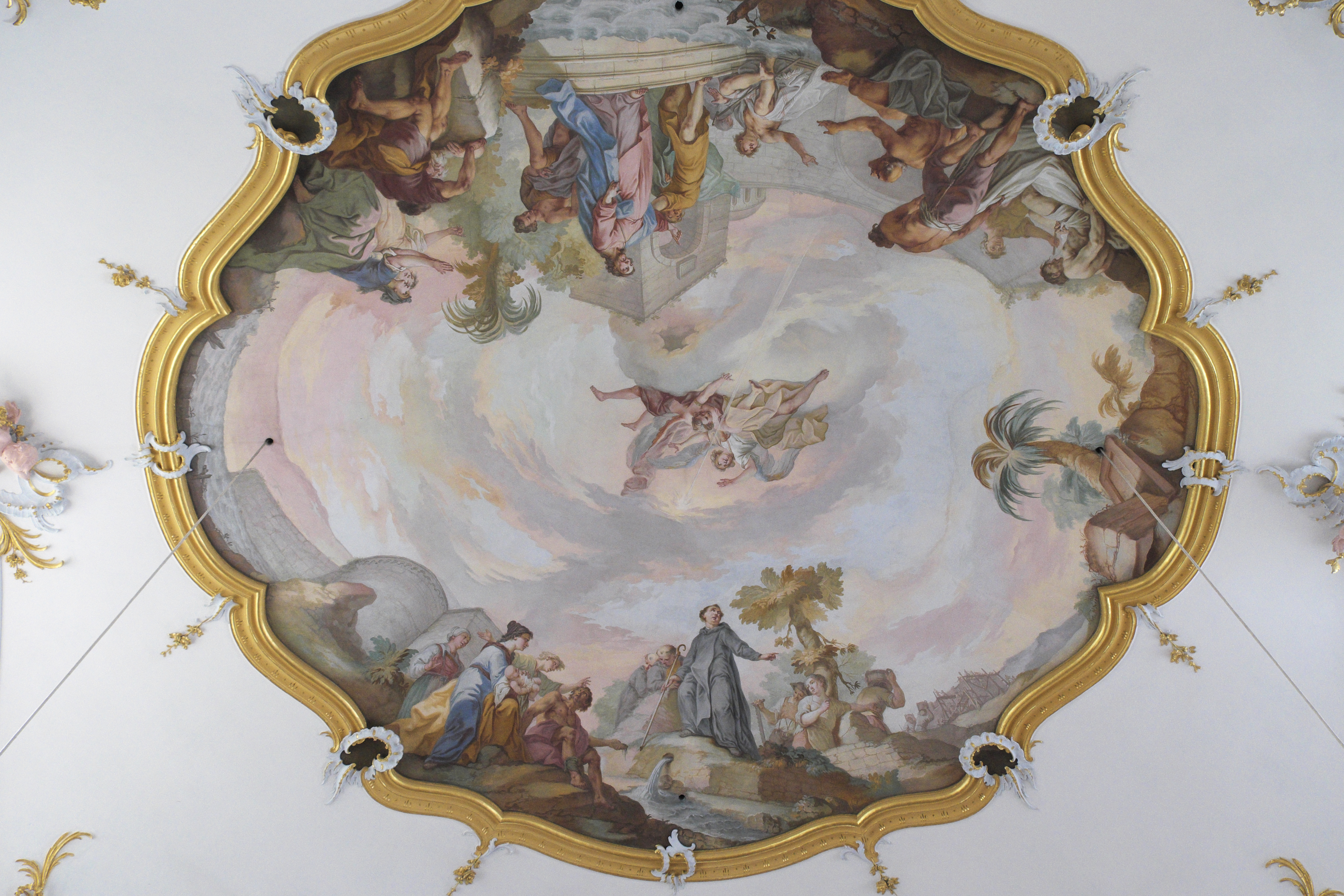 Katholische Pfarr- und Klosterkirche St. Alto und St. Birgitta in Altomünster im Landkreis Dachau (Bayern), Deckenfresko im Beichtraum von Joseph Mages (1728–1769), Darstellung: Hl. Alto entdeckt seine Quelle, Jesus heilt einen Gelähmten am Teich Bethesda